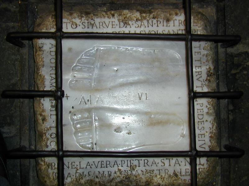 Roma, via Appia Antica, Chiesa del Quo vadis: ex voto romano ritenuto l'impronta dei piedi di San Pietro.